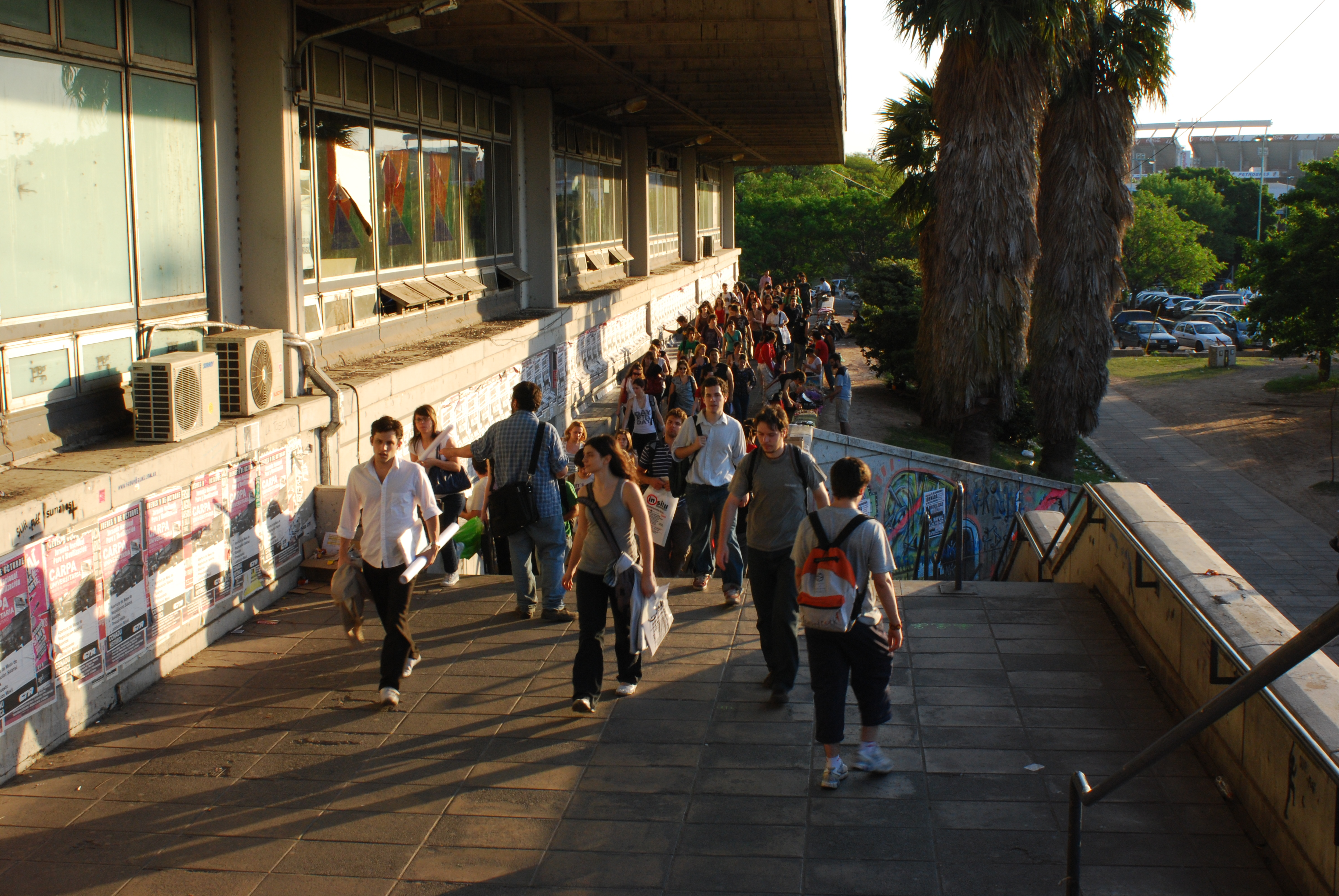 Estudiantes dirigiéndose hacia la entrada del pabellón III en la Ciudad Universitaria de Buenos Aires, Argentina, noviembre 2008.